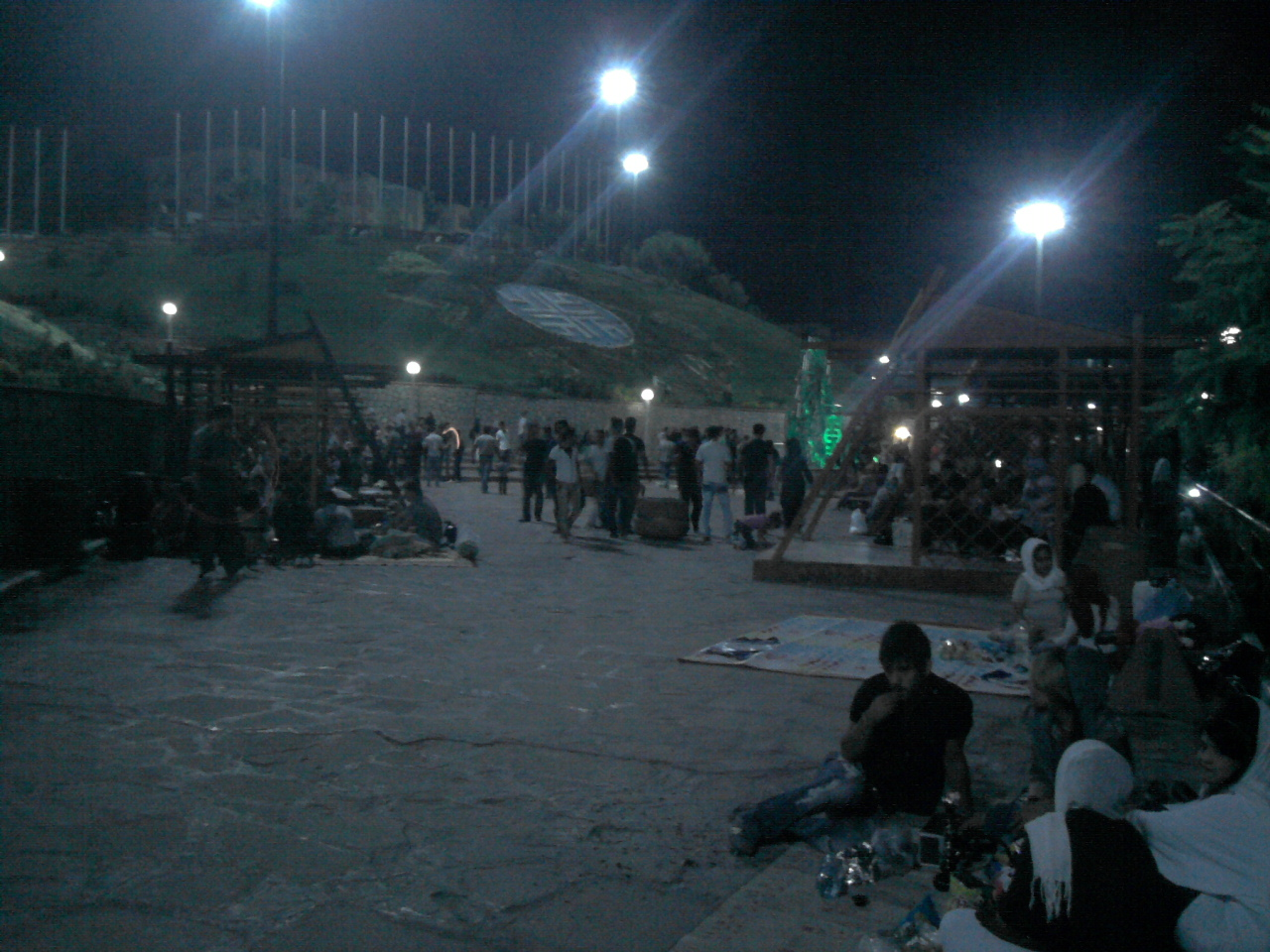 Srpskohrvatski / српскохрватски: Noć u parku Nahdž al-balagi 2011.